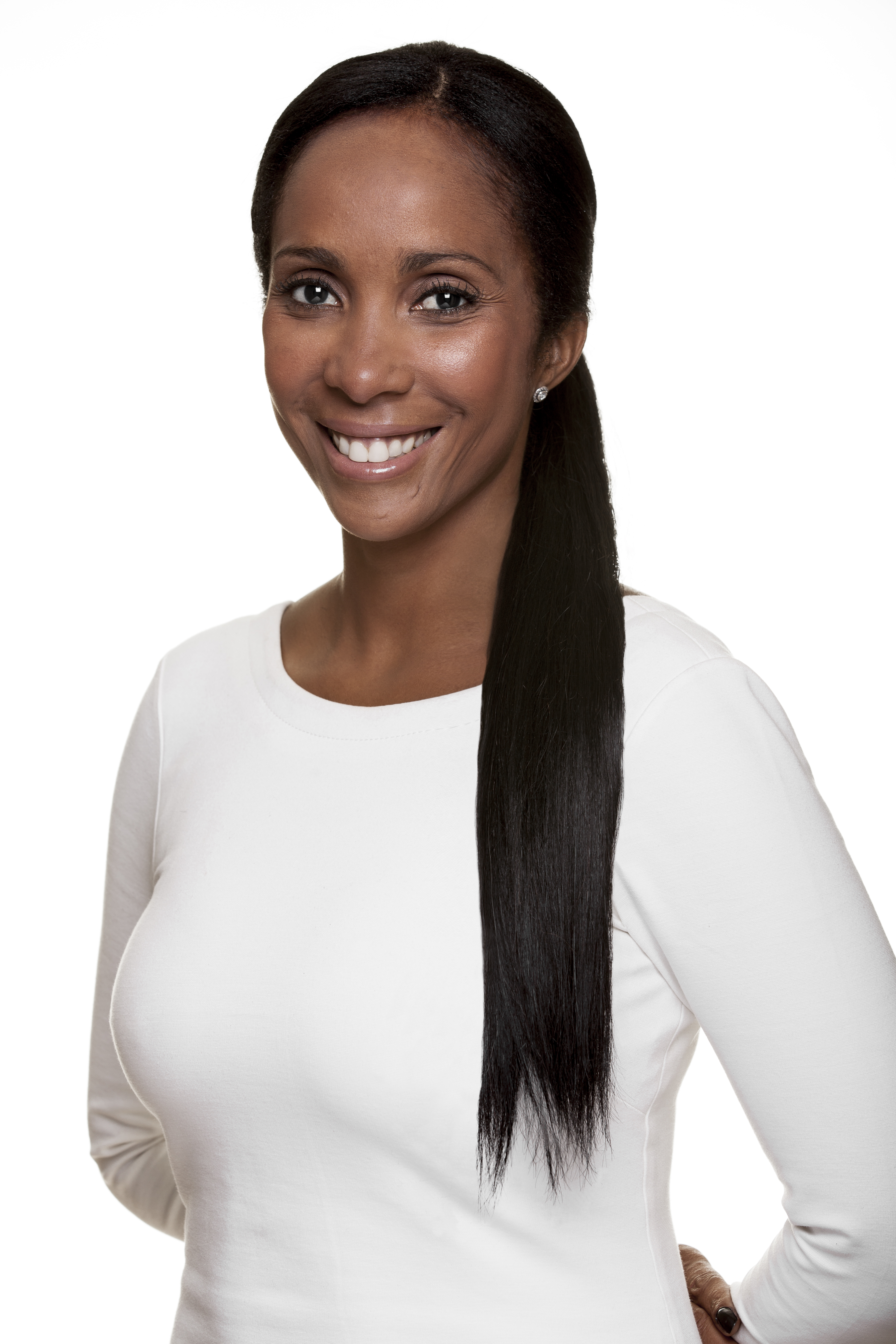 La doctora Yaisy Picrin Duany